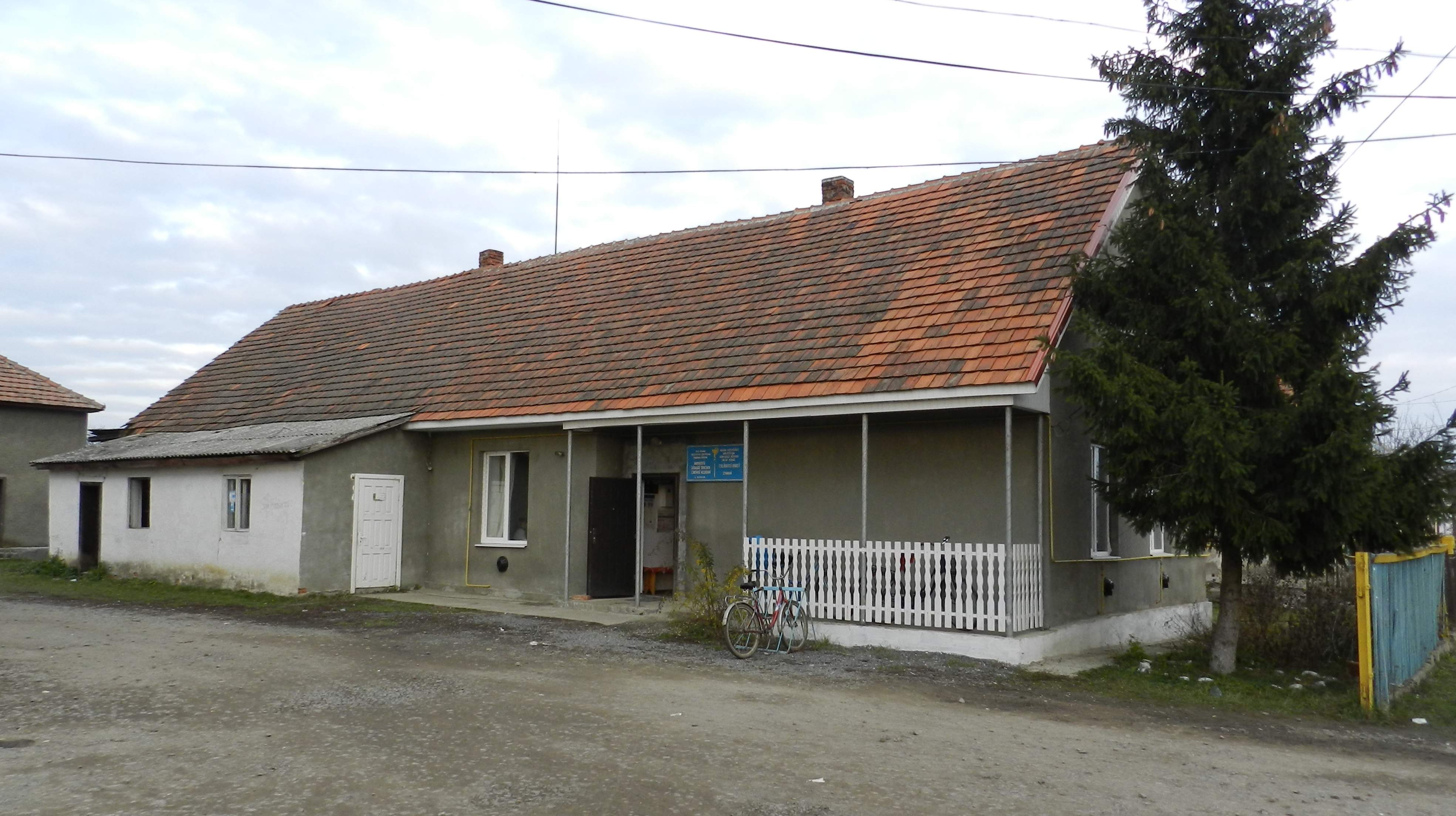 Колишній будинок чехословацьких легіонерів, нині сільська амбулаторія